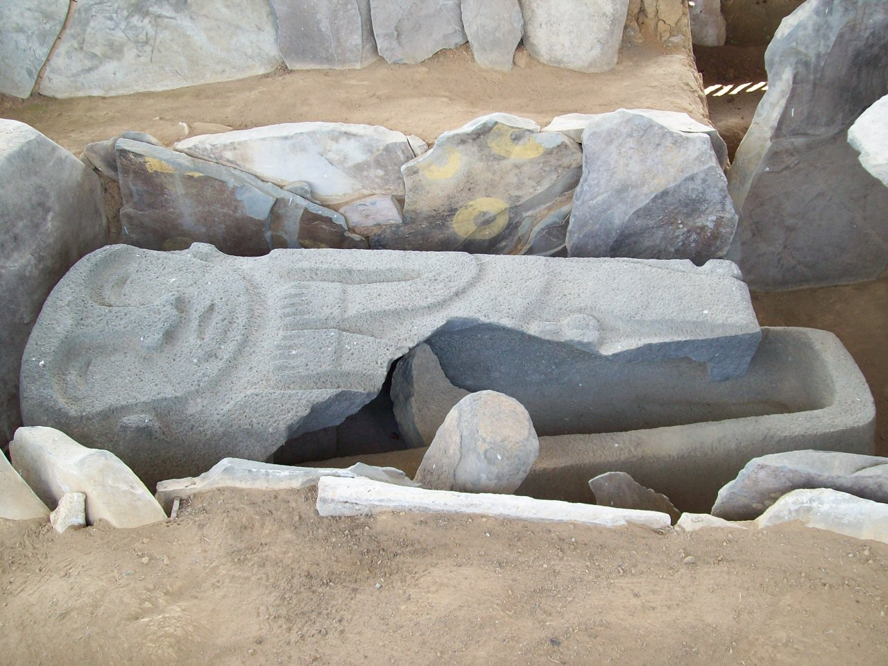 Montículo 3 - ALTO DE LOS ÍDOLOS SAN AGUSTÍN HUILA: La gran cámara contiene un sarcófago con la tapa tallada con una figura masculina que parece con los ojos cerrados. en la tumba, las lajas de la pared están decoradas con círculos amarillos y centro negro y se conservan rastros de rojo.